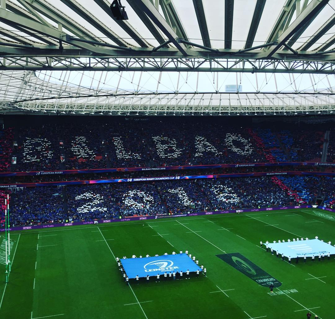 Final de la Champions Cup 2018 en Bilbao